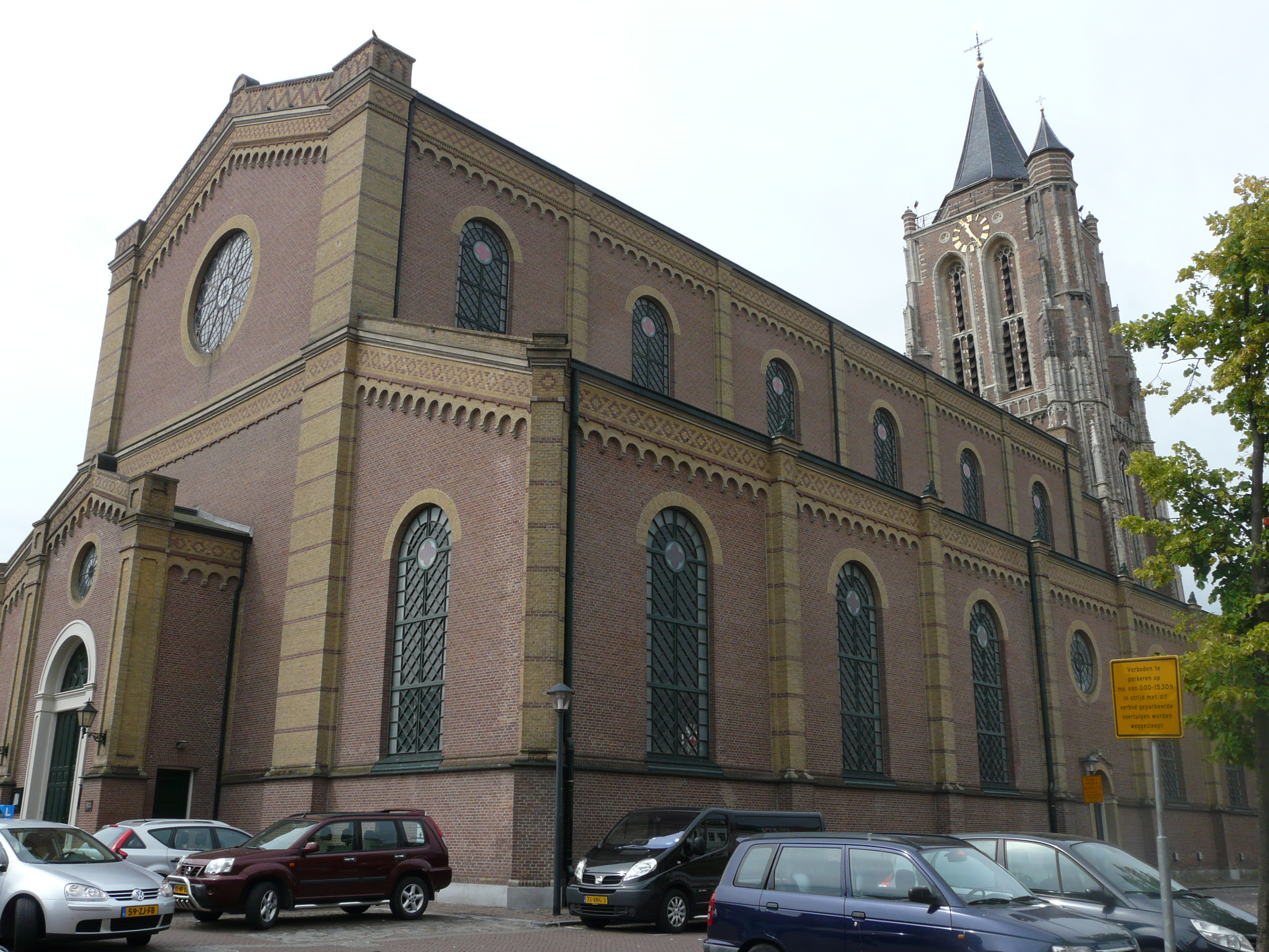 Zicht op een deel van het exterieur van de Grote kerk gelegen in het centrum van Gorinchem. Niet ver van de Grote Markt